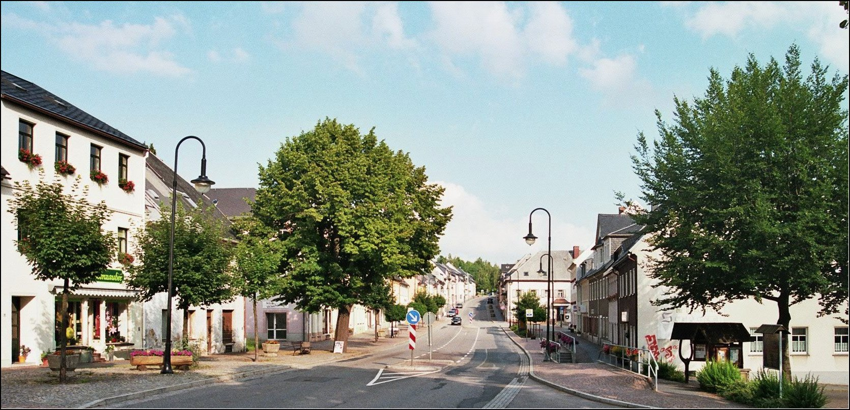 Sayda: Blick in die Dresdner Straße